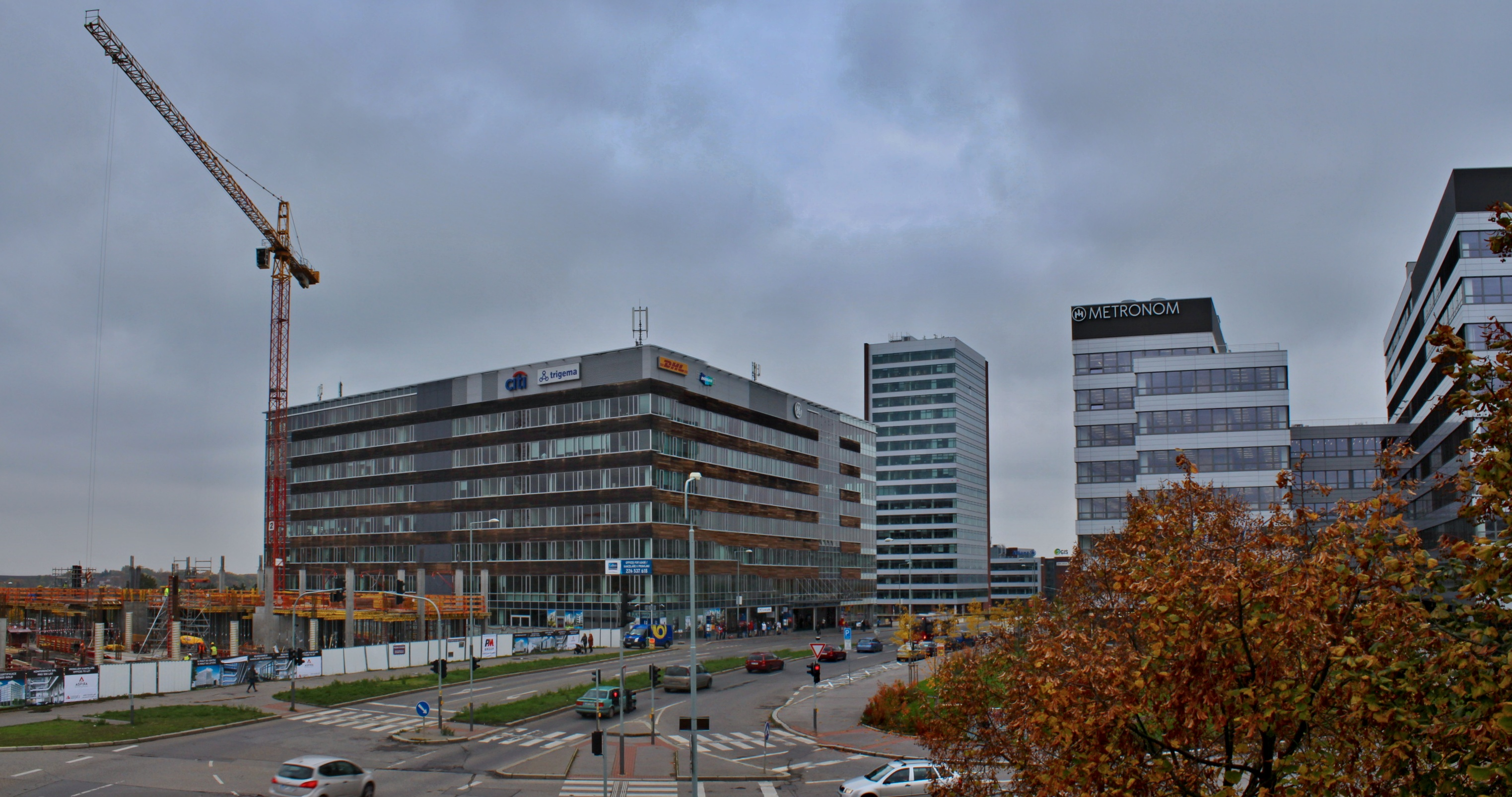 Explora Jupitel Business Center